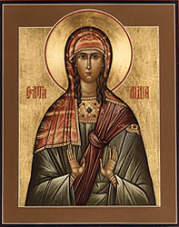 Heilige Lydia (I Jahrhundert)